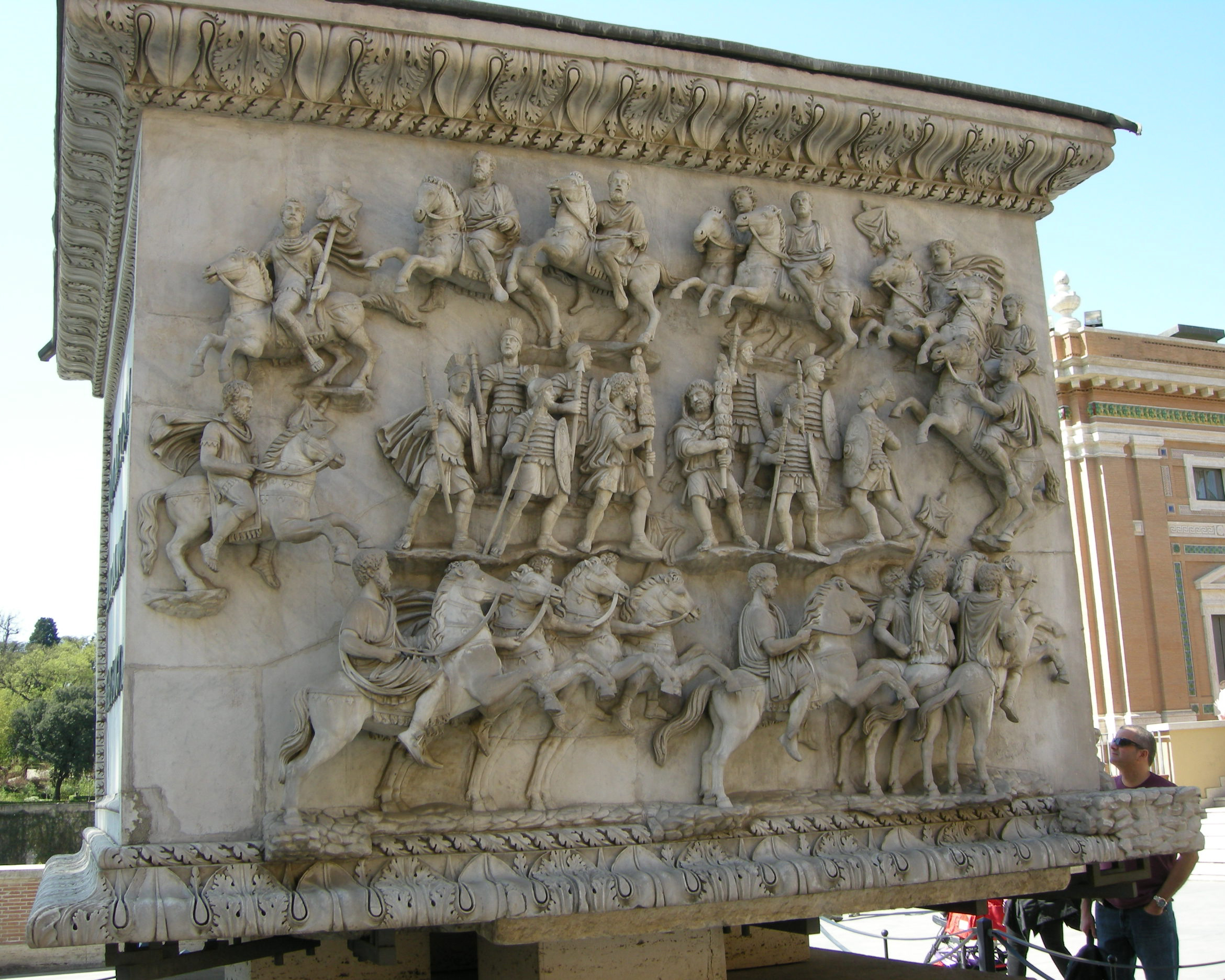 Base della colonna antonina